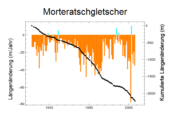 Gletscherrückgang am Morteratschgletscher. Schwarze Linie: Aufsummierte Längenänderung seit Beginn der Messungen im Jahr 1881 in Meter. Orange/ blaue Balken: Jährliche Längenänderung in Meter (Orange: Abnahme, Blau: Zunahme)